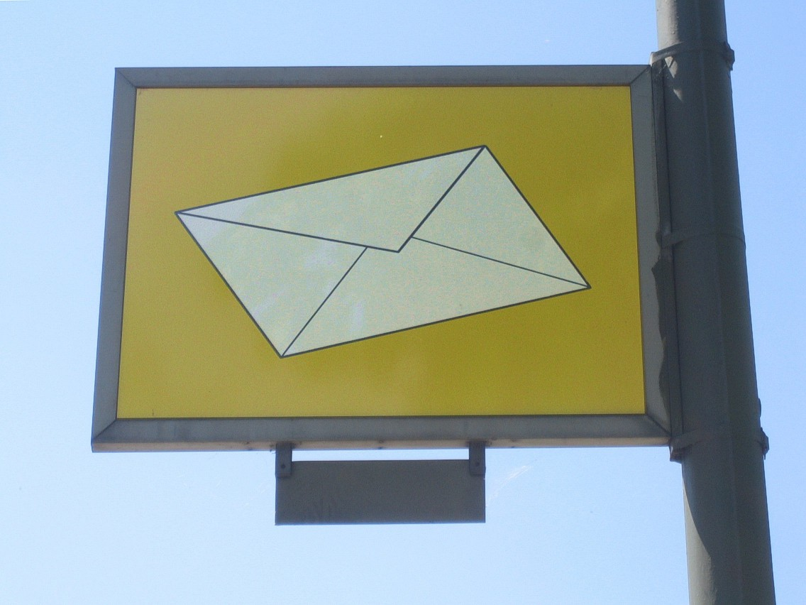 Berlin-Schöneberg, Bayerisches Viertel. Denkmal zur Erinnerung an die Unterdrückung der Juden 1933-1945. Tafel mit Abschiedsbrief. Bildseite.